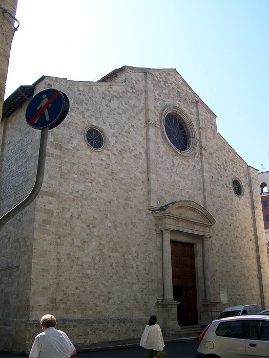 Ascoli Piceno - Chiesa di S. Pietro Martire